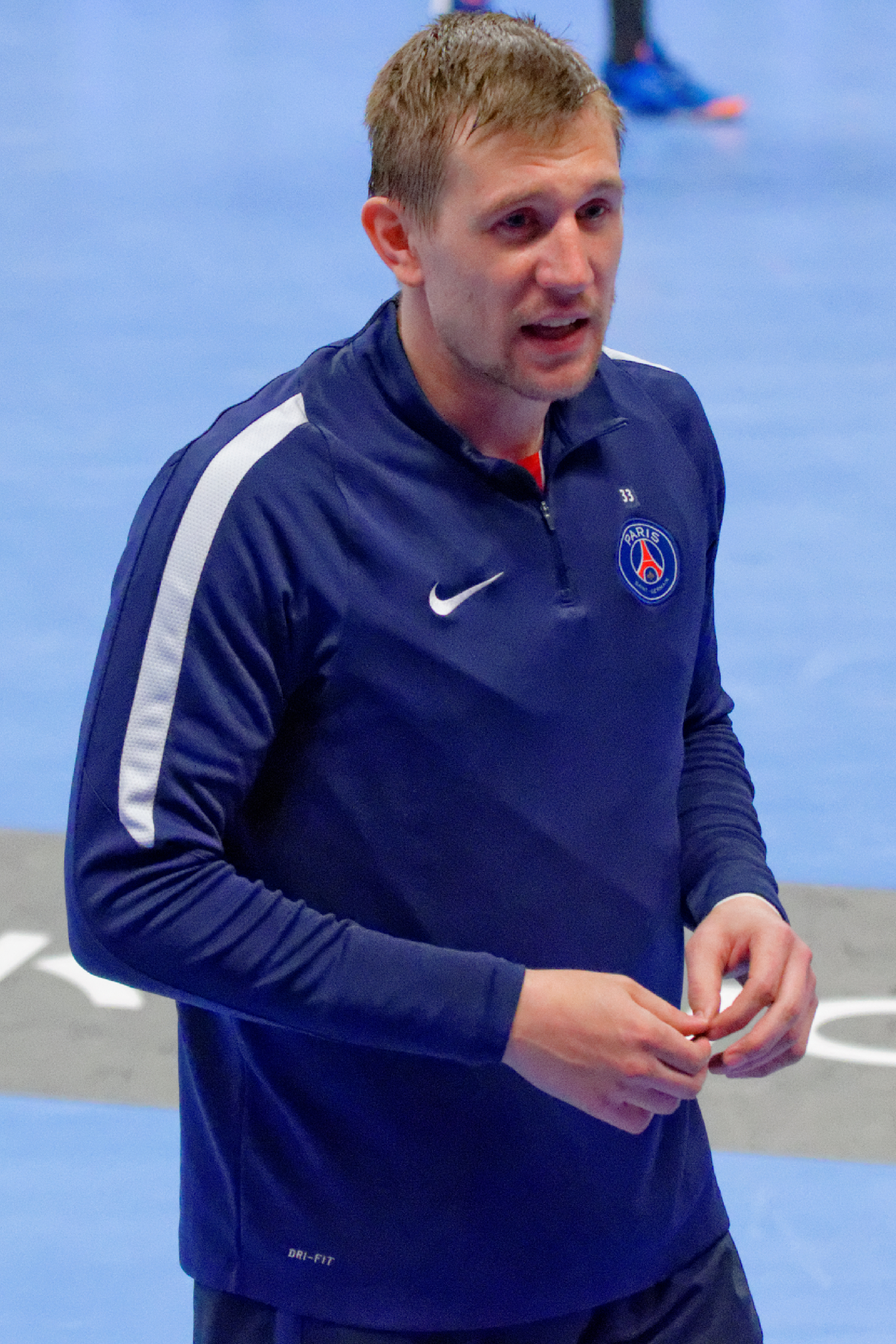 PSG Handball / Toulouse Fenix Handball lors de la 21e journée du championnat de France de handball masculin le 16 avril 2016 au stade Pierre de Coubertin à Paris.